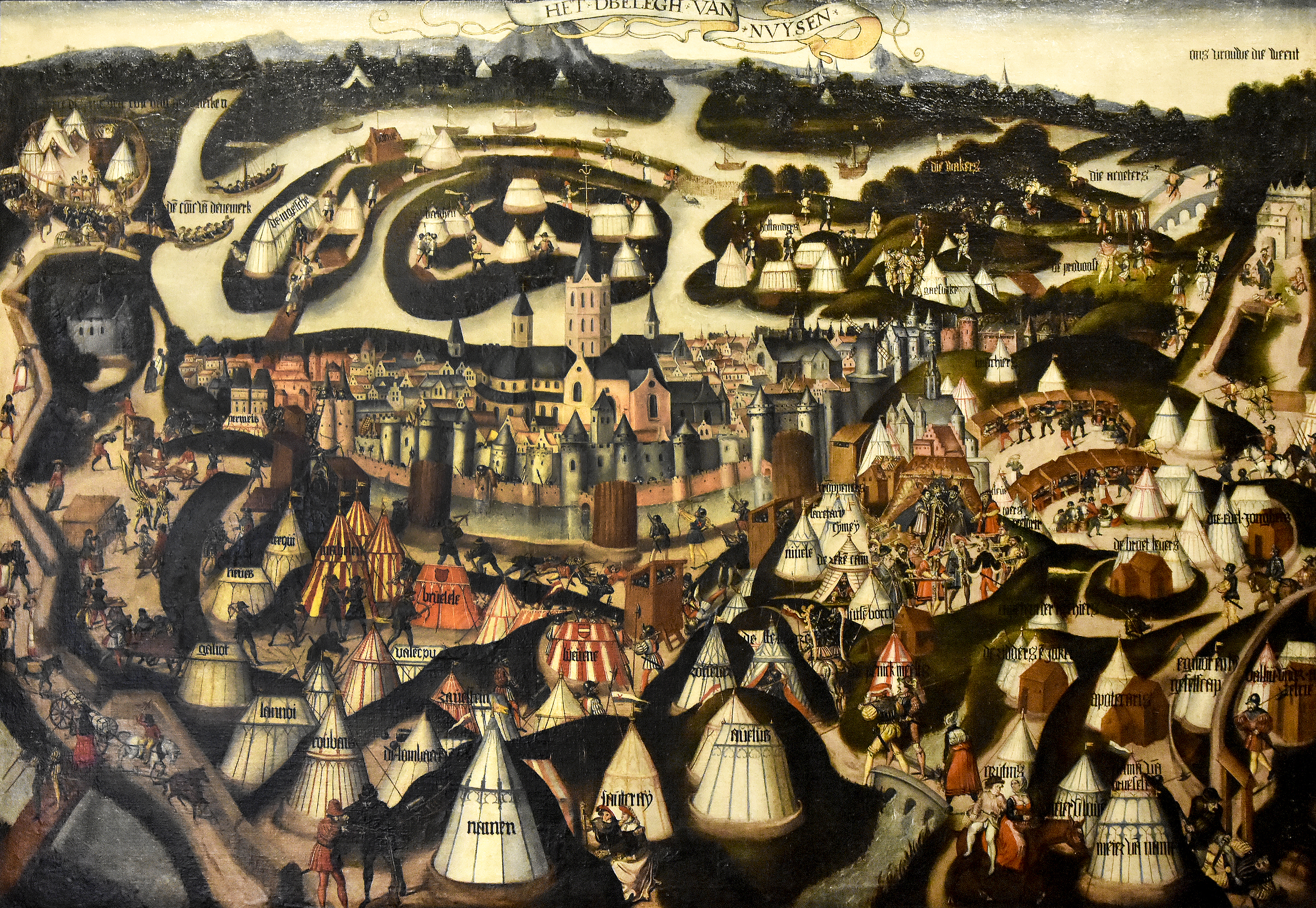 Adriaen van den Houte (16e E) Kamp van Karel de Stoute bij het beleg van Neuss (1475) Museum Hof van Busleyden Mechelen This photo of movable heritage has been taken in the Flemish Region